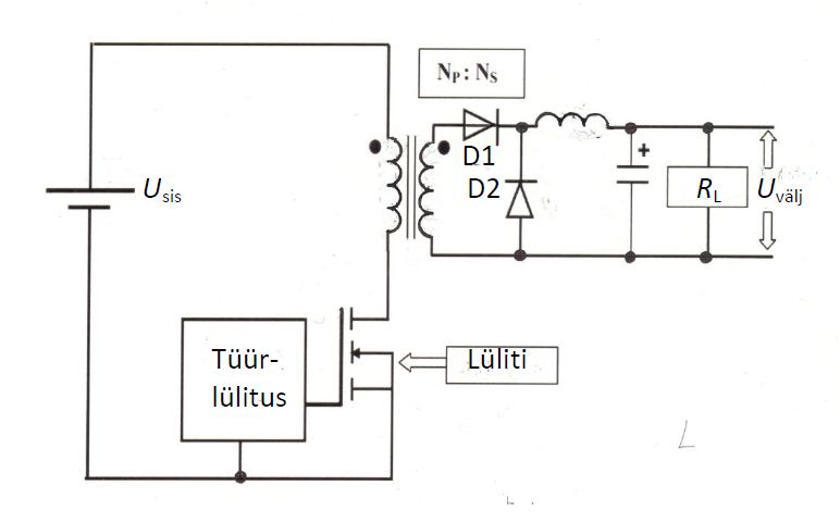 Enda tehtud